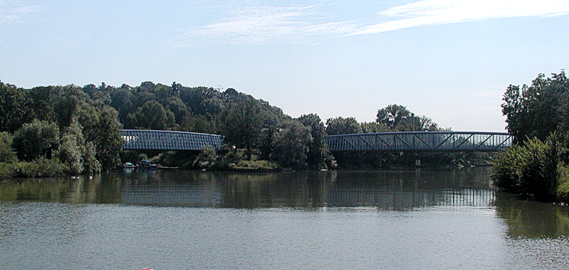 Die Rad- und Fußgängerbrücken über den Neckar und die Rems